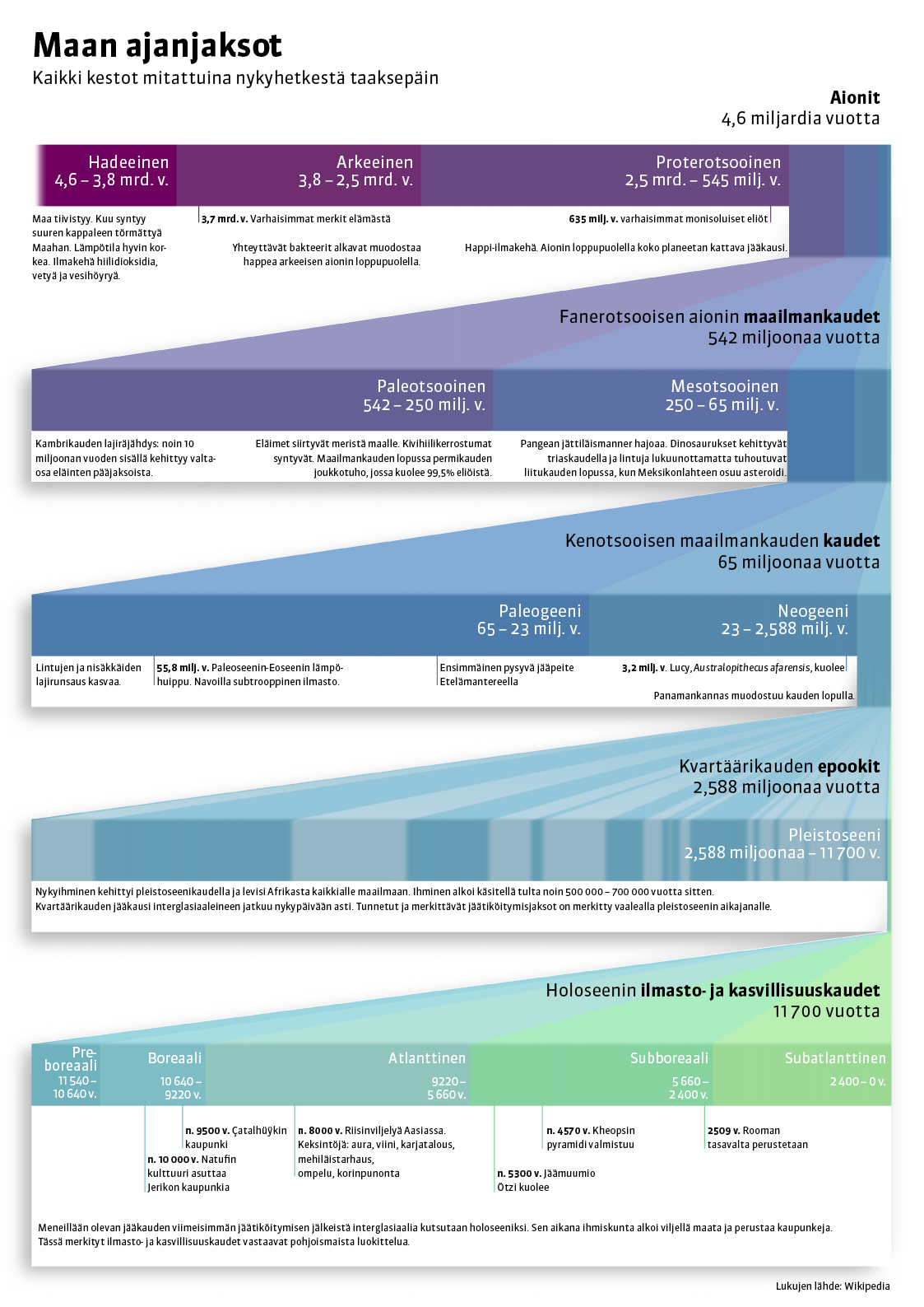 Maan geologisen historian jakotavat visualisoituna järjestyksessä ylhäältä alaspäin.